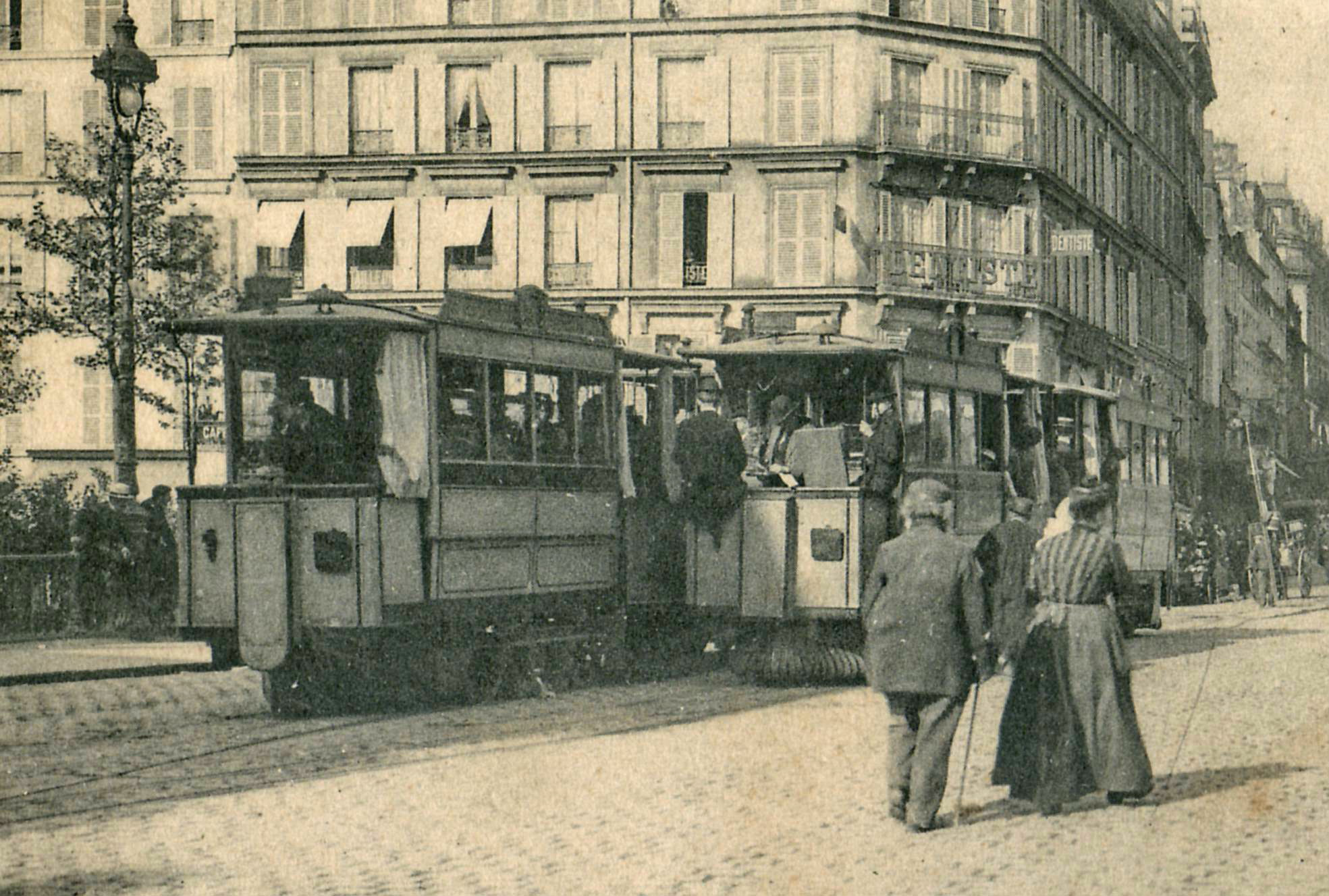 Détail d'une carte postale ancienne éditée par GI n°472 PARIS : le Faubourg-du-Temple Vue en gros plan d'un croisement de rames du Tramway funiculaire de Belleville